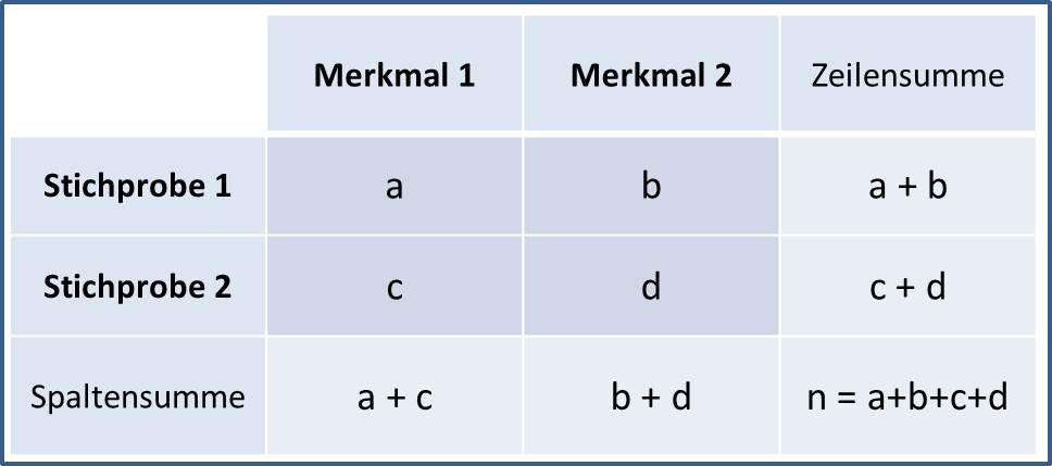 Die Vierfeldertafel (auch 2x2 Kontingenztafel) kommt zur Berechnung des χ²-Vierfeldertests zur Anwendung.